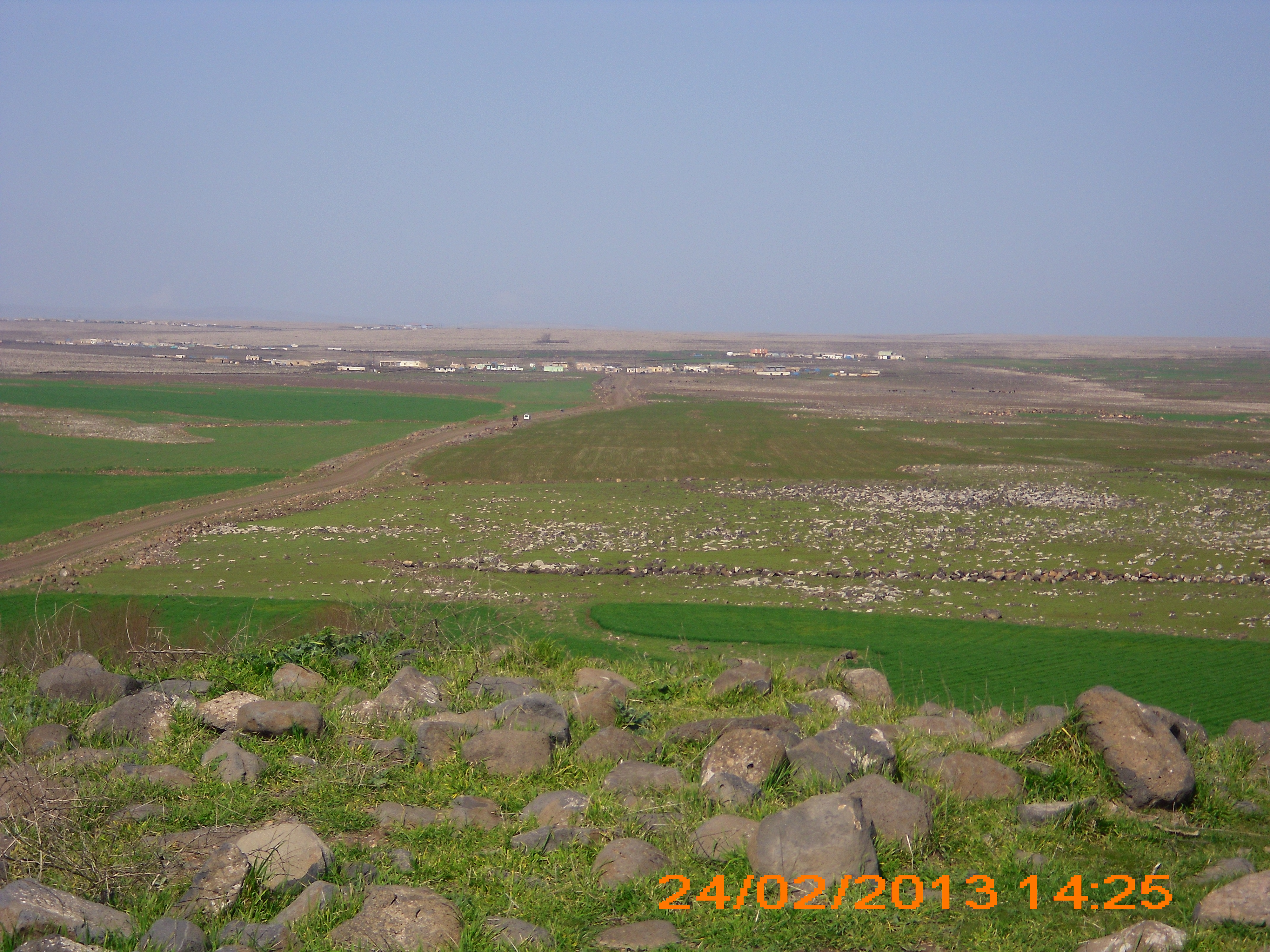 63700 Altınbaşak/Viranşehir/Şanlıurfa, Turkey